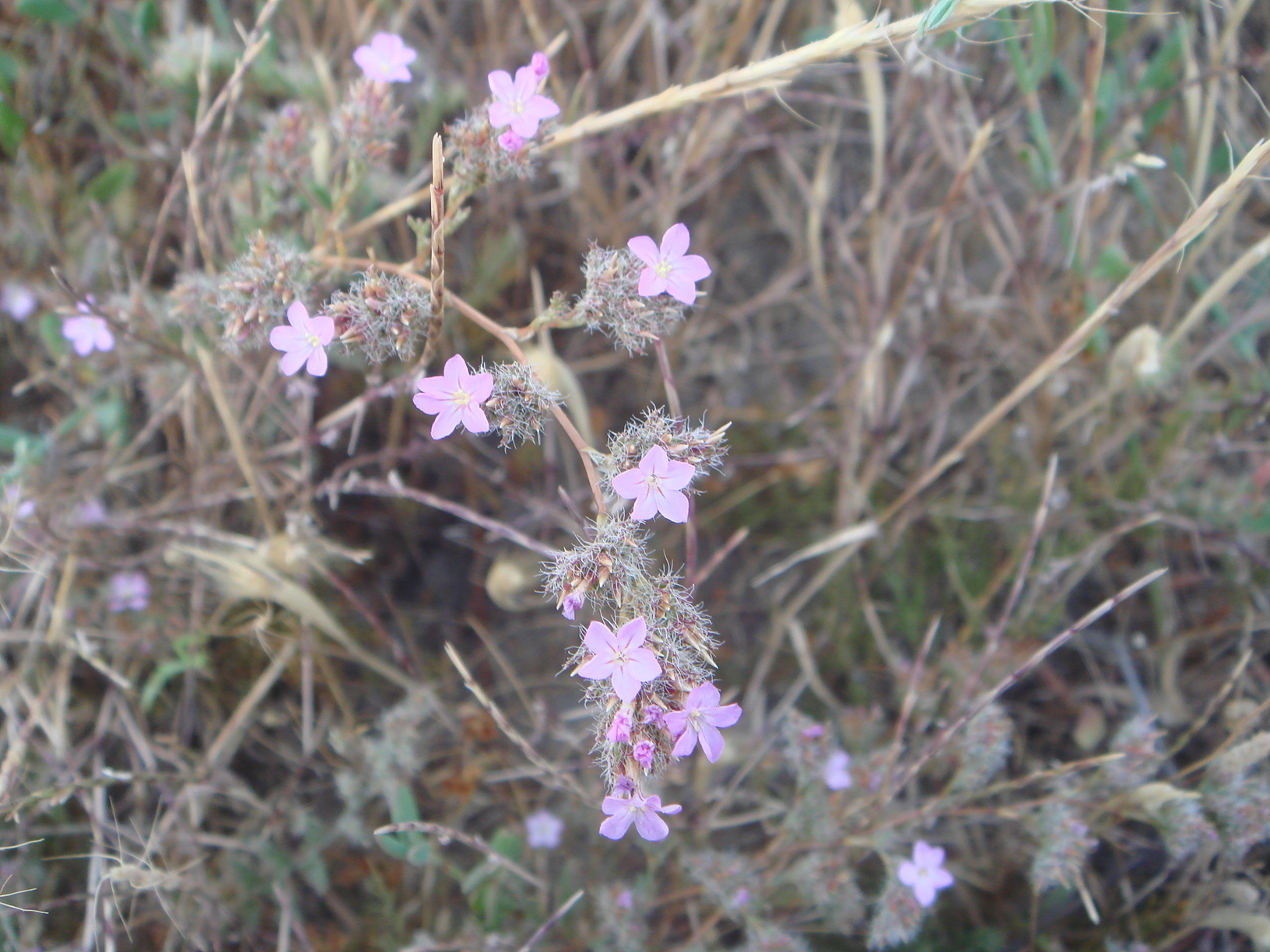 Myriolepis ferulacea (L.) Lledó, Erben & M.B. Crespo,Marismas de la Bahía de Cádiz, San Fernando, España.